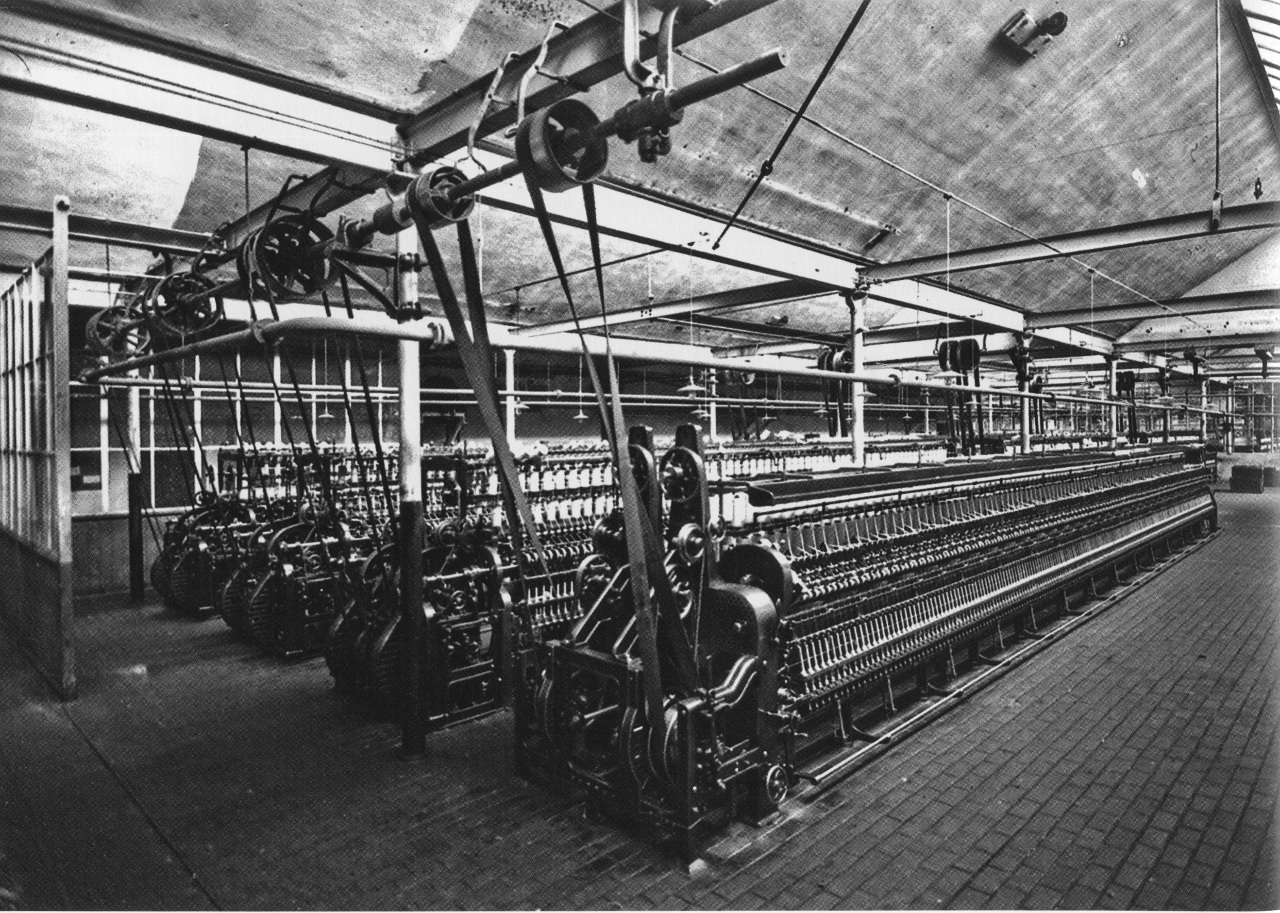 Innenansicht der Kammgarnspinnerei Pfaffendorf in Leipzig, Pfaffendorfer Straße 31–33.